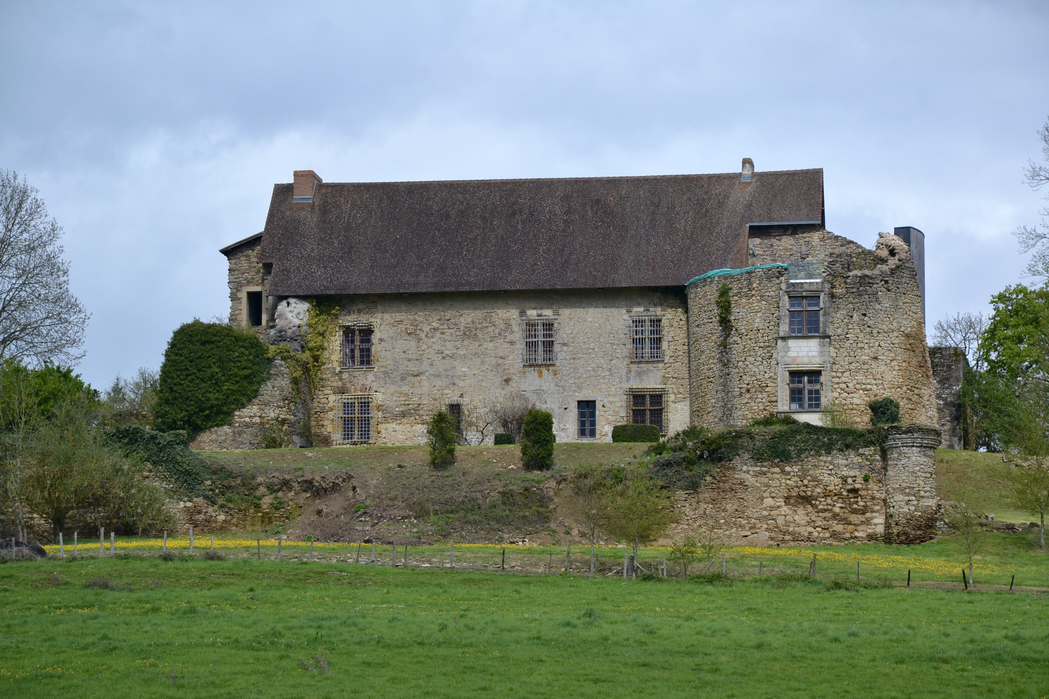 L'ancien château de Vicq-sur-Breuilh (Haute-Vienne, France).